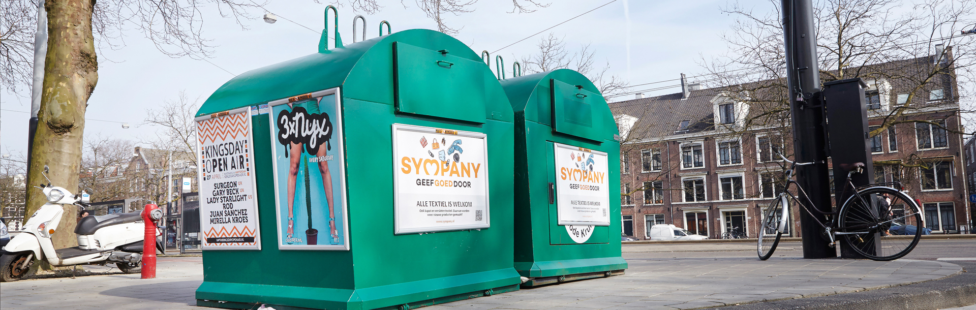 Sympany Textielcontainer